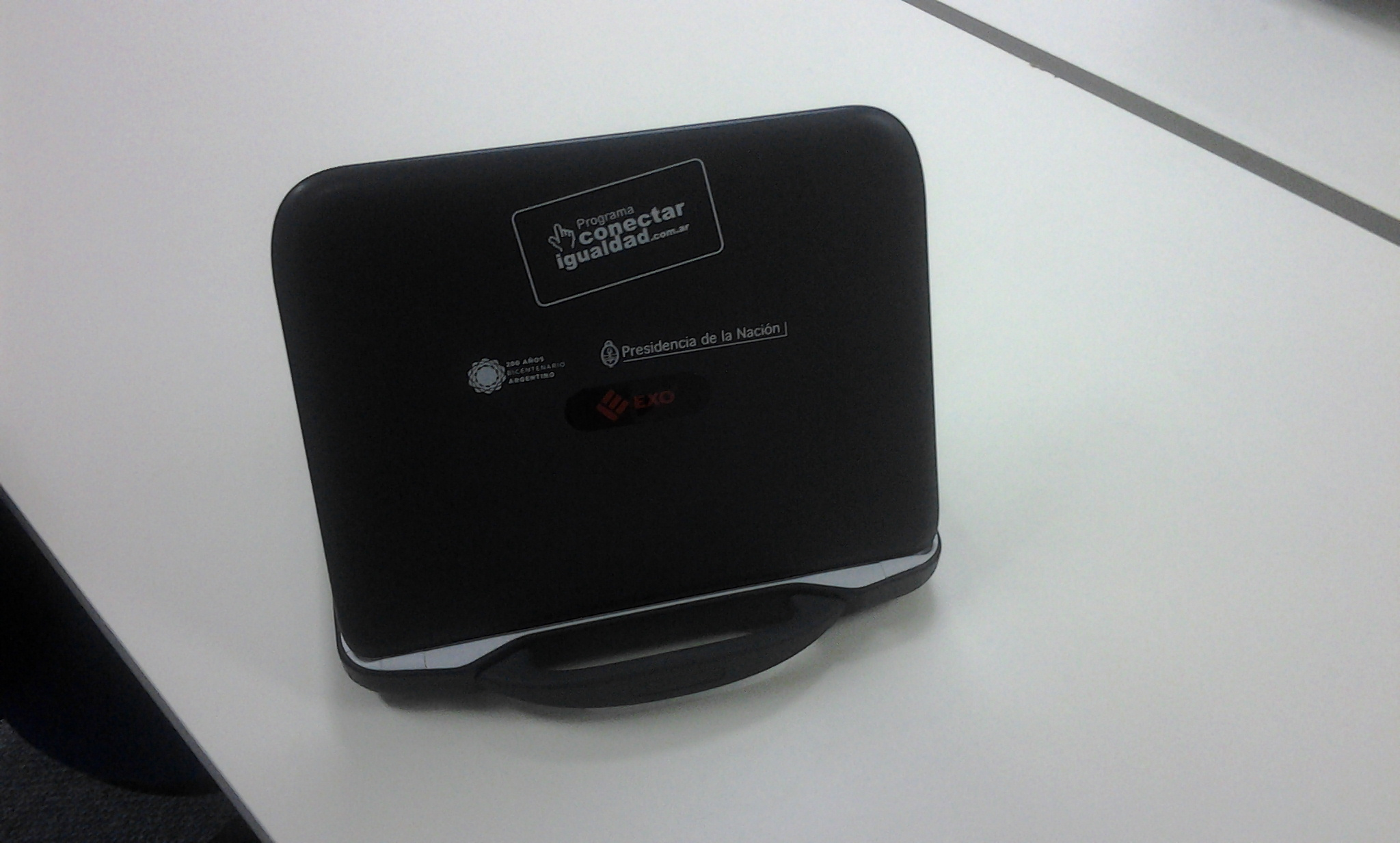 Una classmate pc del programa conectar igualdad